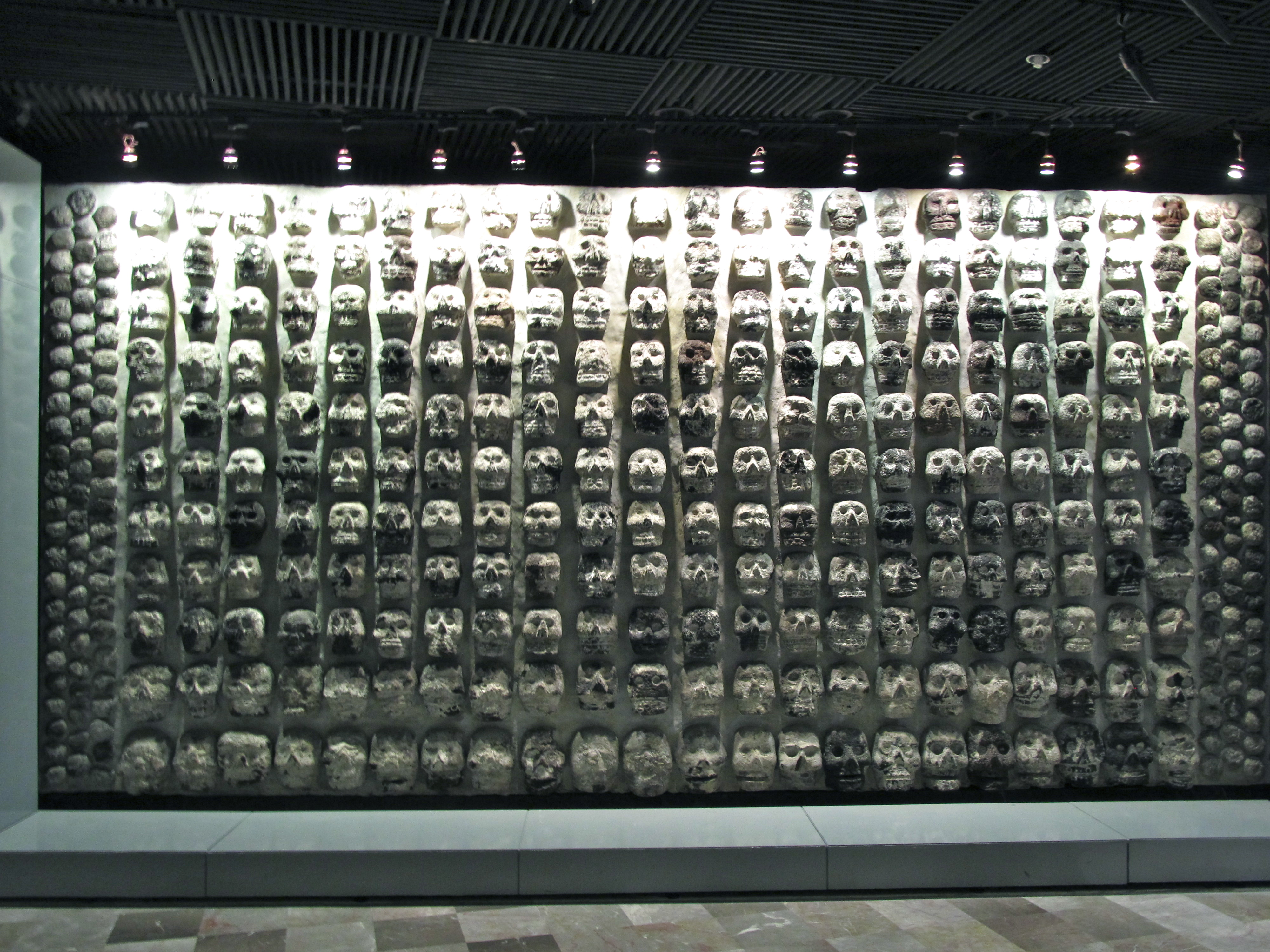 Tzompantli